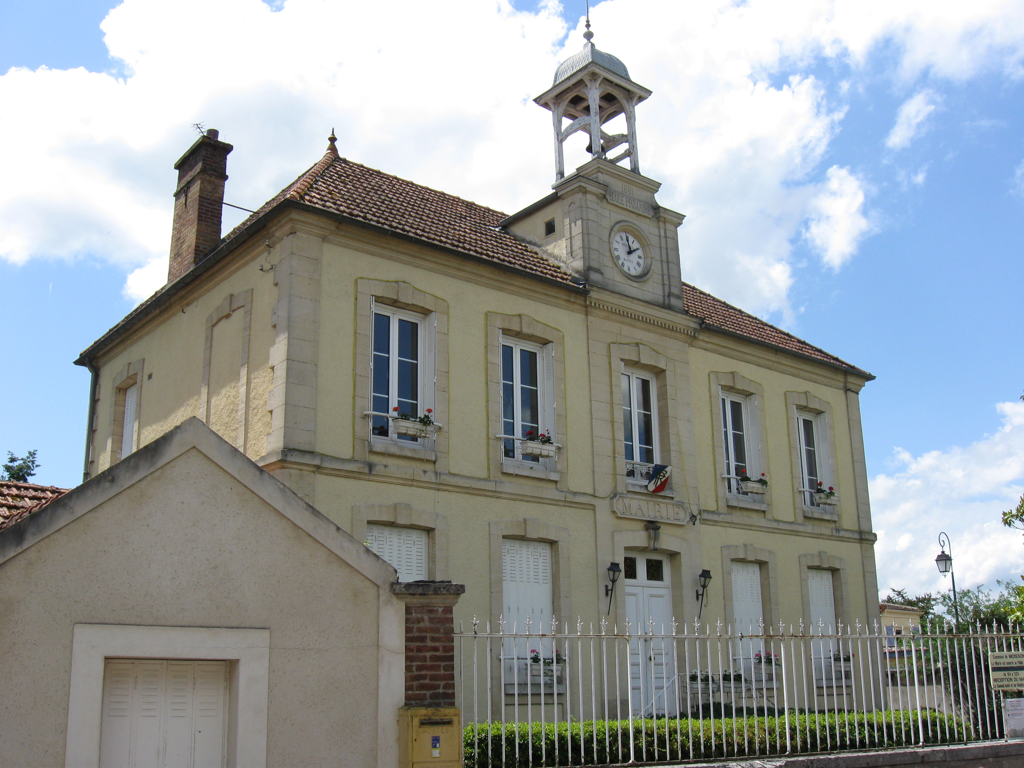 Mairie de Moisson. (département des Yvelines, région Île-de-France).